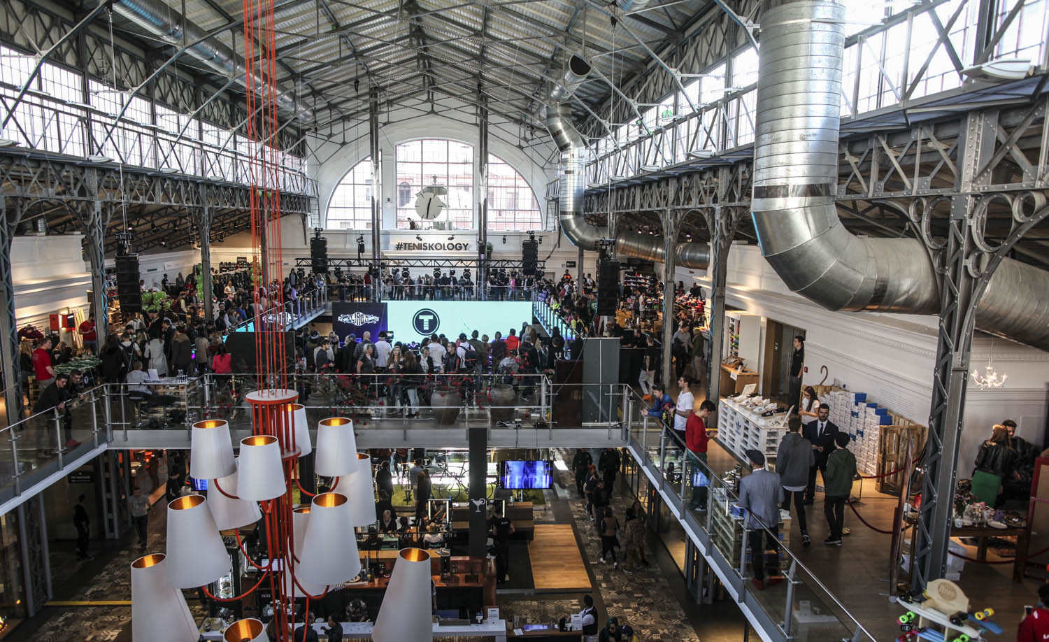 Teniskology 2015